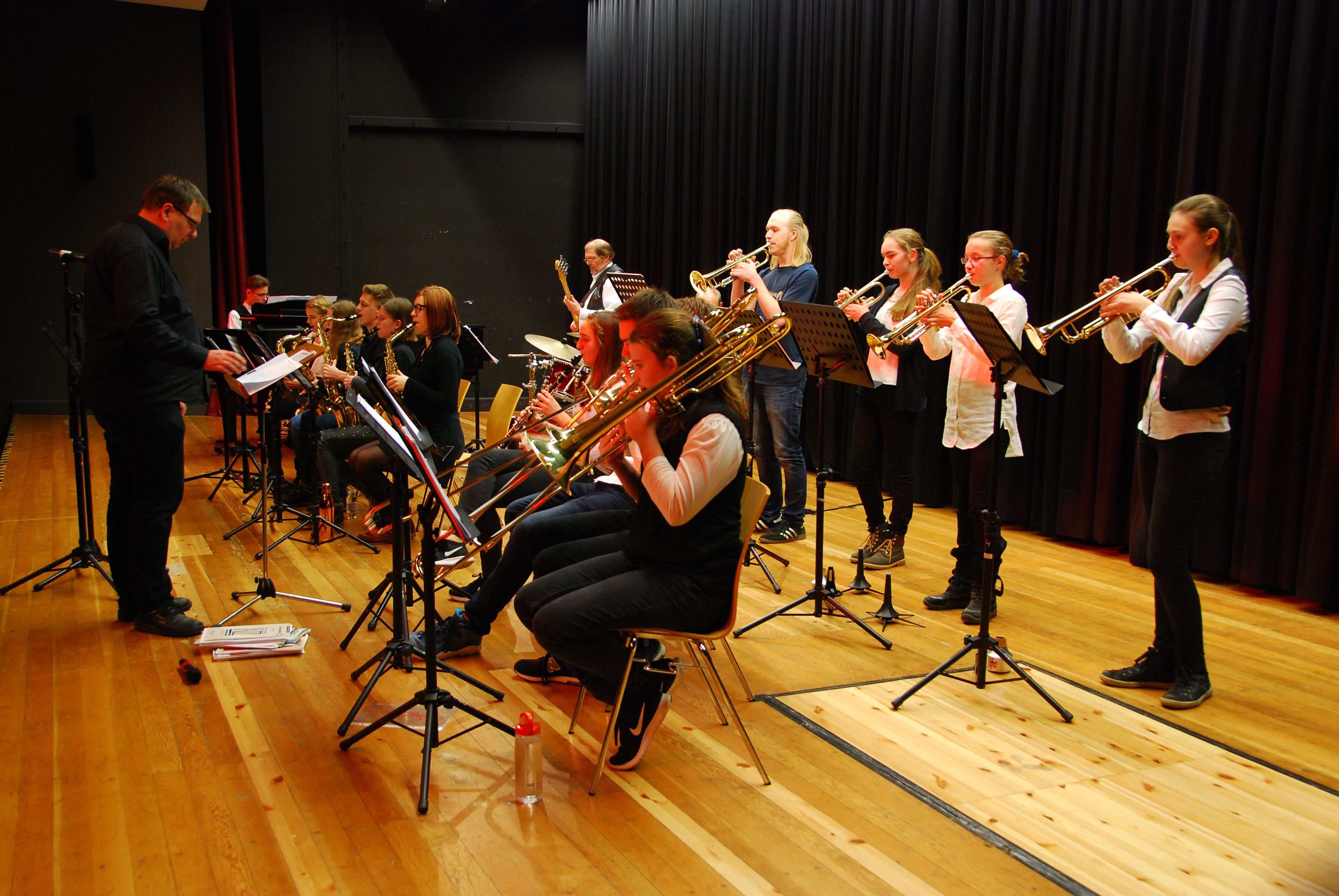 Big Band des Gymnasiums Neue Oberschule